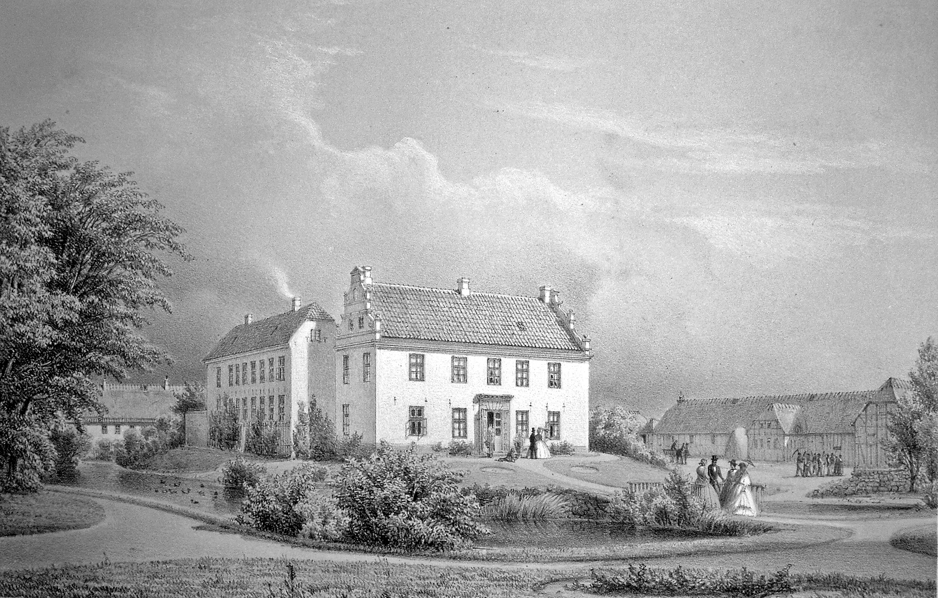 Kørup var en landsbyhovedgård fra middelalderen, der er nævnt første gang i 1410. Gården ligger i Krogsbølle Sogn, Skam Herred, Otterup Kommune. Hovedbygningen er opført i 1582 og parken er på 2 hektar.